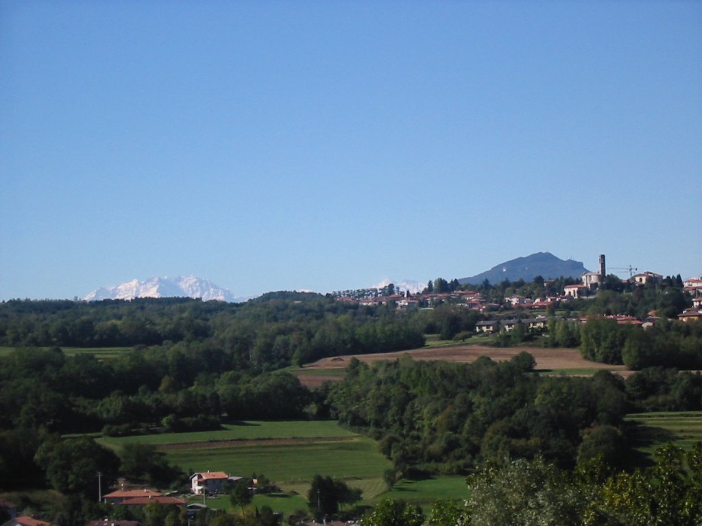 Un panorama di Uggiate-Trevano